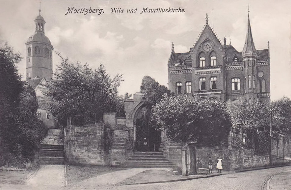 Der Hildesheimer Moritzberg um das Jahr 1900